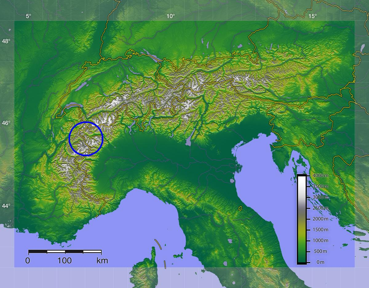 Грайские Альпы на карте Альп